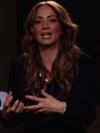 Andrea Legarreta y sus hijas Mía & Nina Rubín Legarreta en entrevista en 2016.